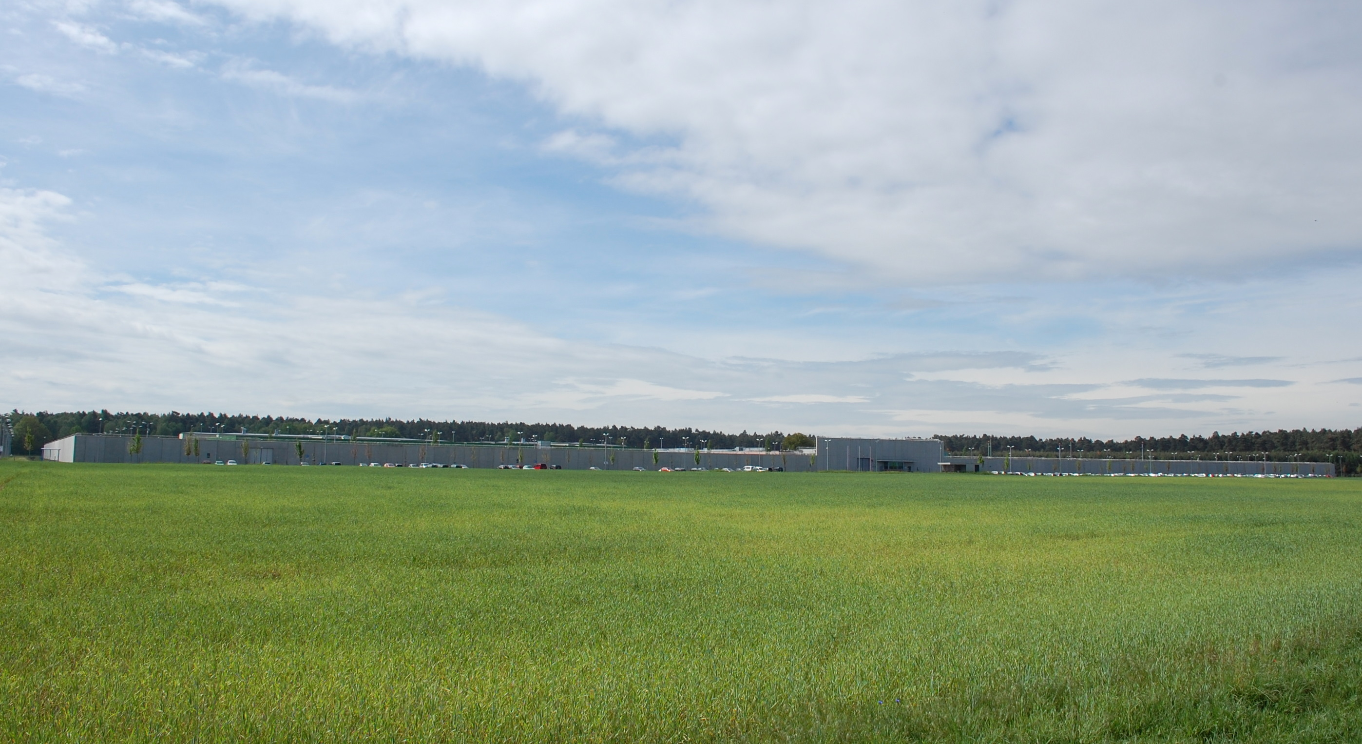 Blick auf die JVA Burg